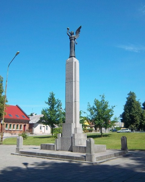 Laisvės paminklas, Žiežmariai